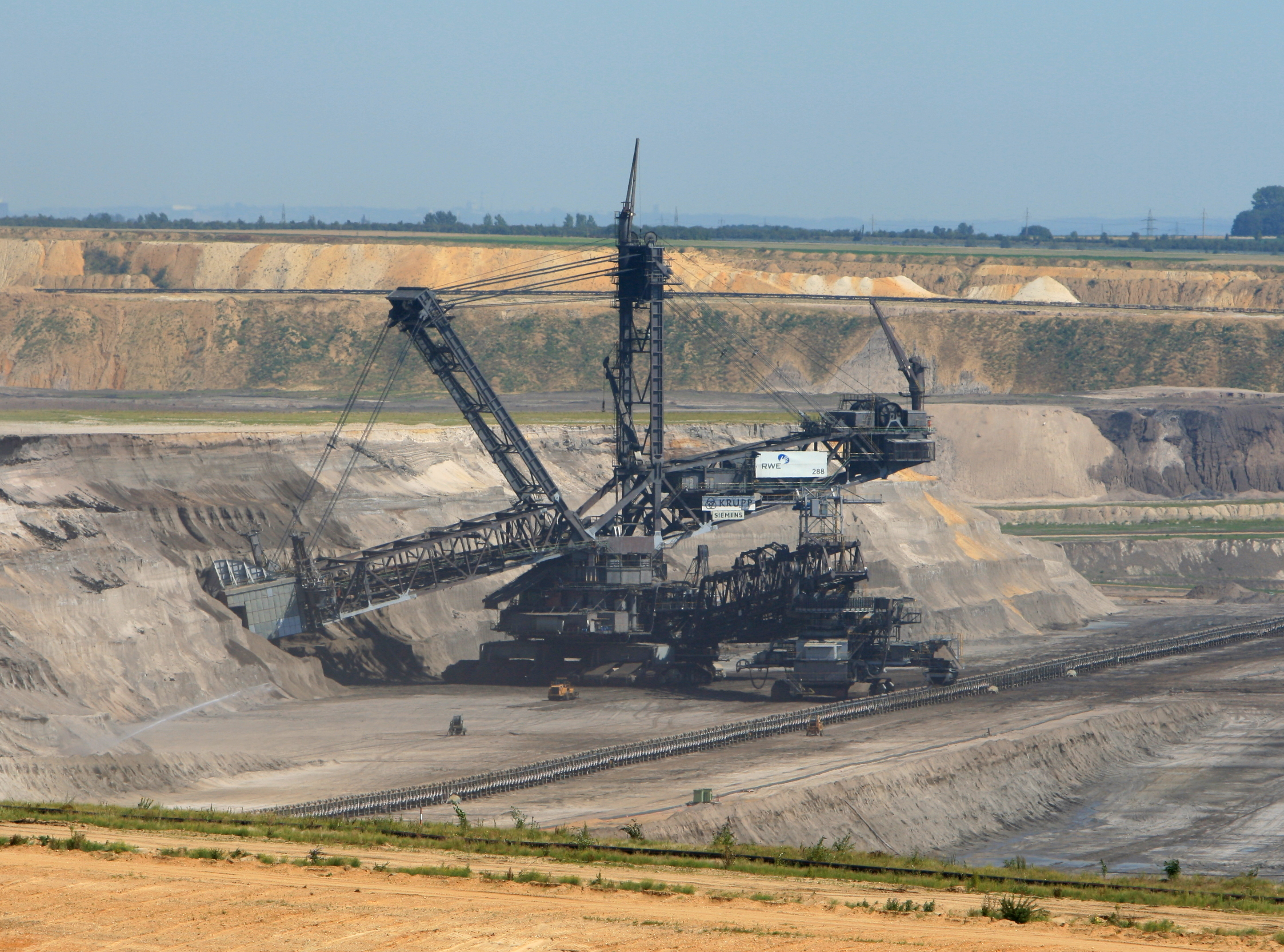 Bagger 288, Tagebau Garzweiler Juechen